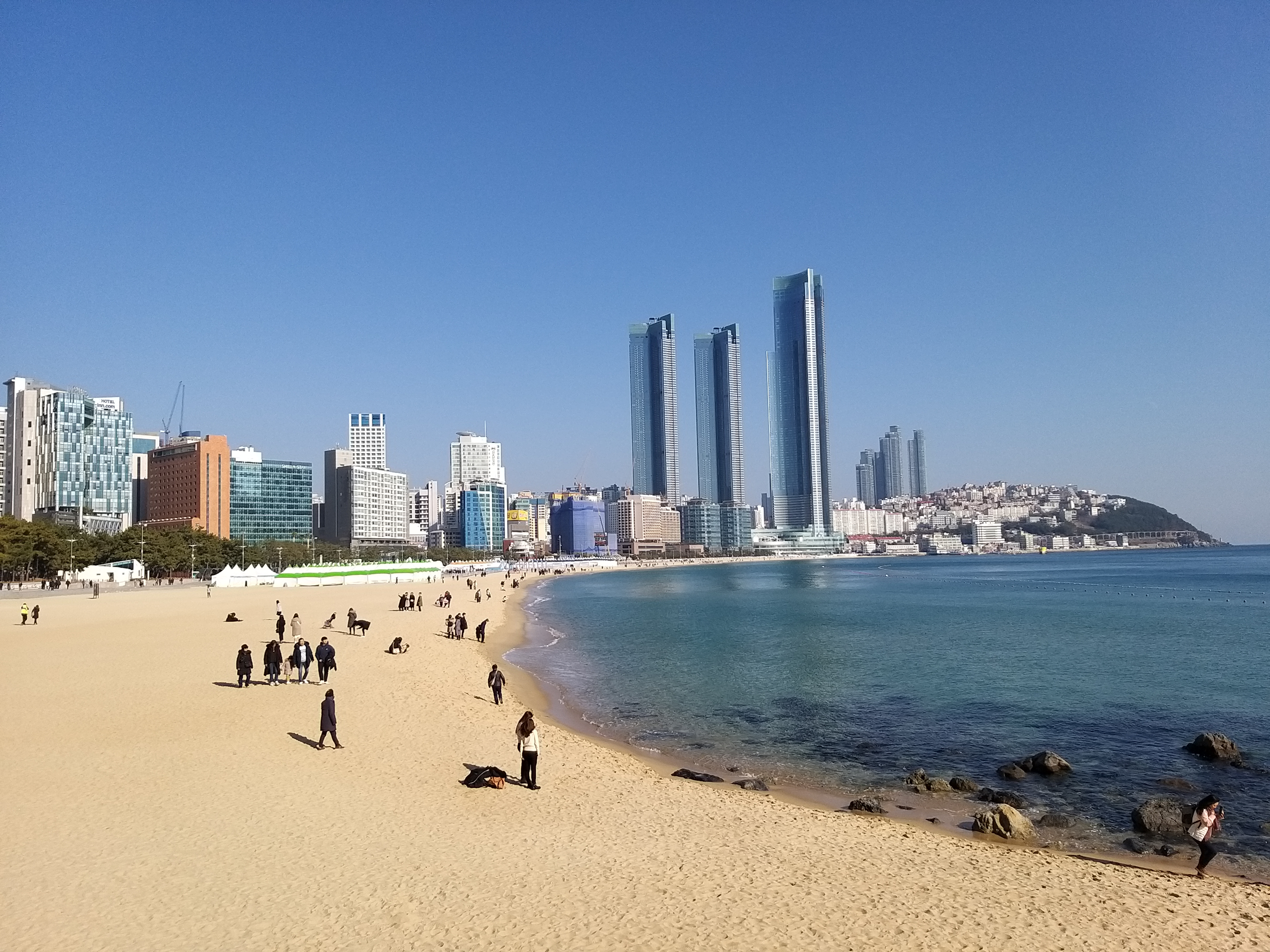 동백섬에서 바라본 해운대 LCT 더샵(2020년 1월 4일)